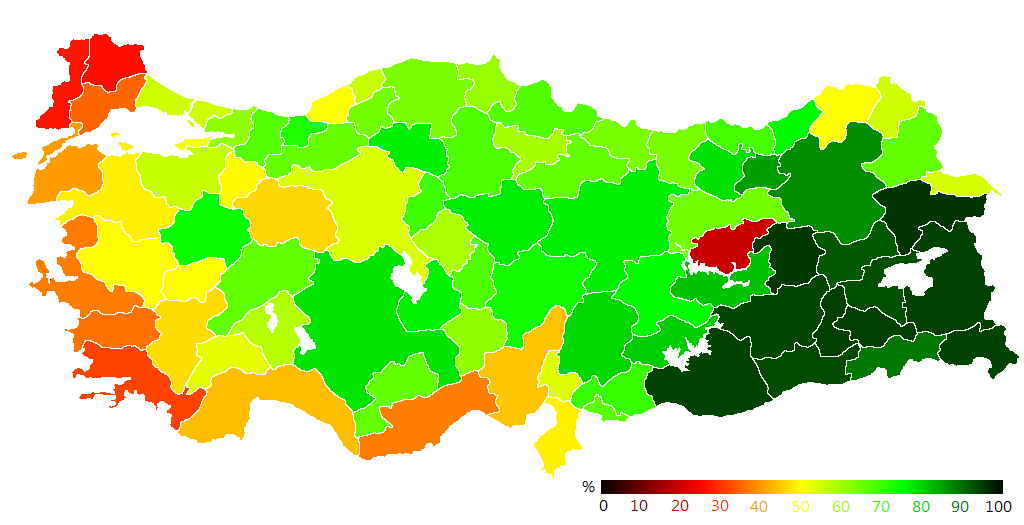 12 Eylül 2010 referamdumunda 'Evet' oylarının illere göre yüzdesel dağılımının haritası